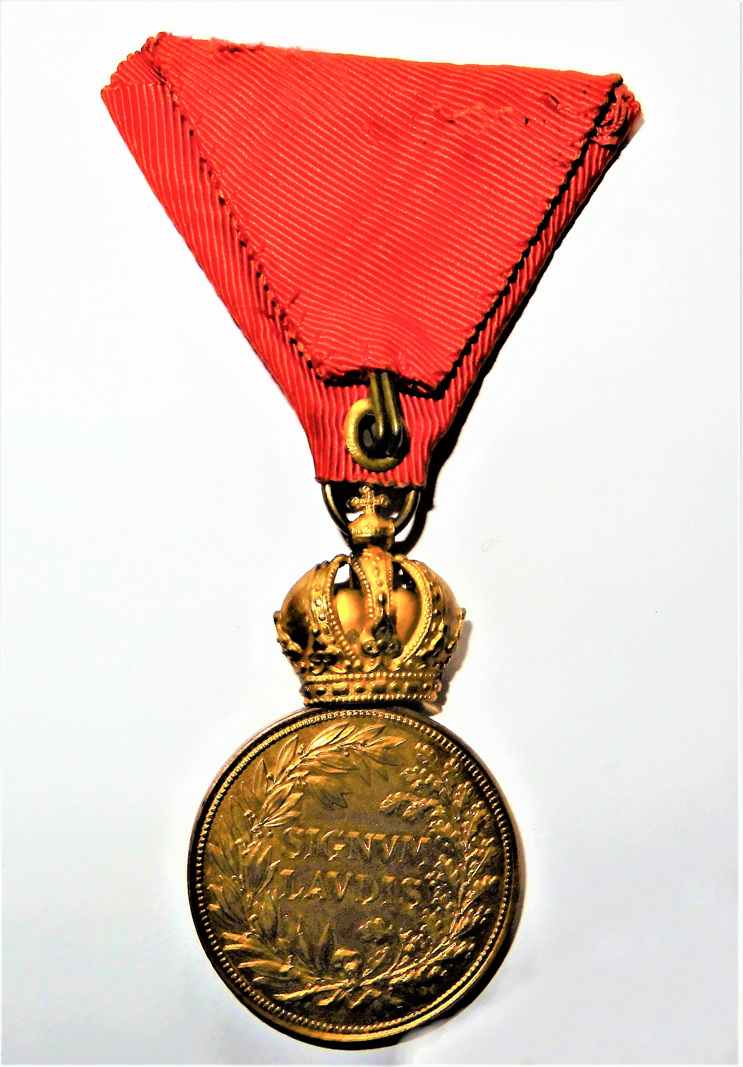 Signum Laudis, Rückseite,am roten Band